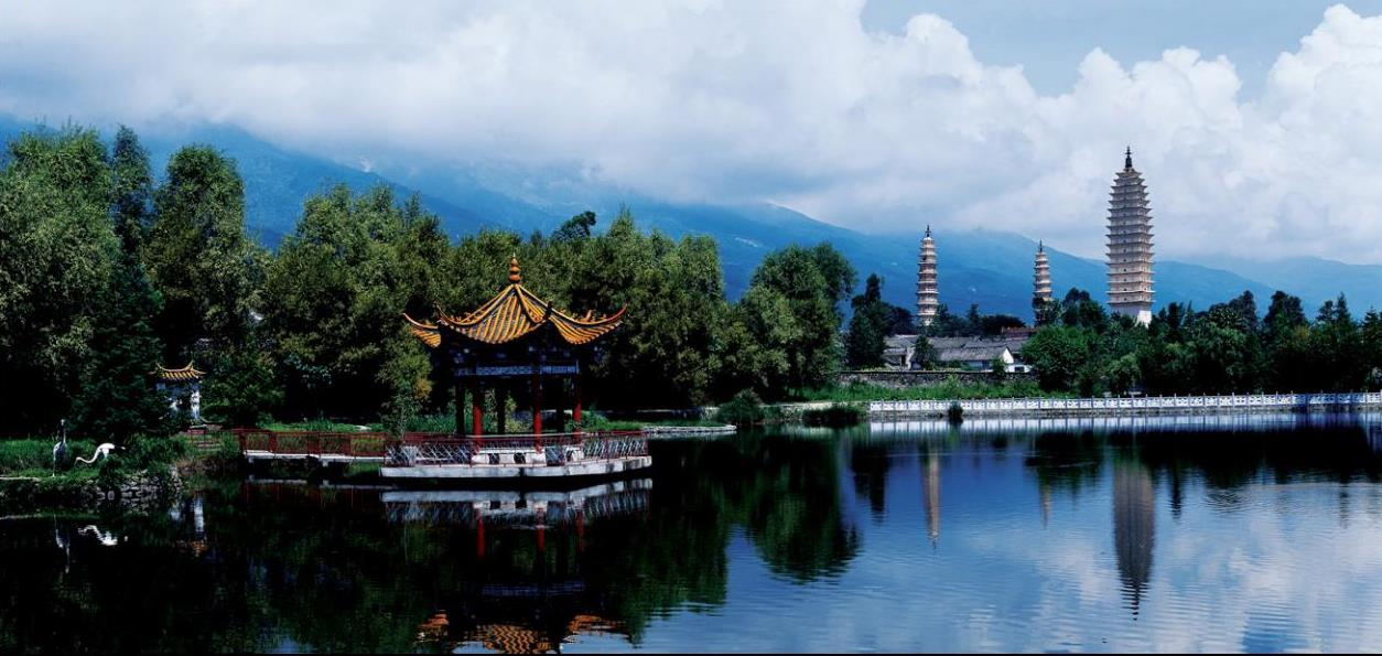 中文（中国大陆）: 崇圣三塔及周边景致。三塔为密檐式砖塔，外观呈弧线轮廓，与西安小雁塔类似，典型的唐代砖塔。